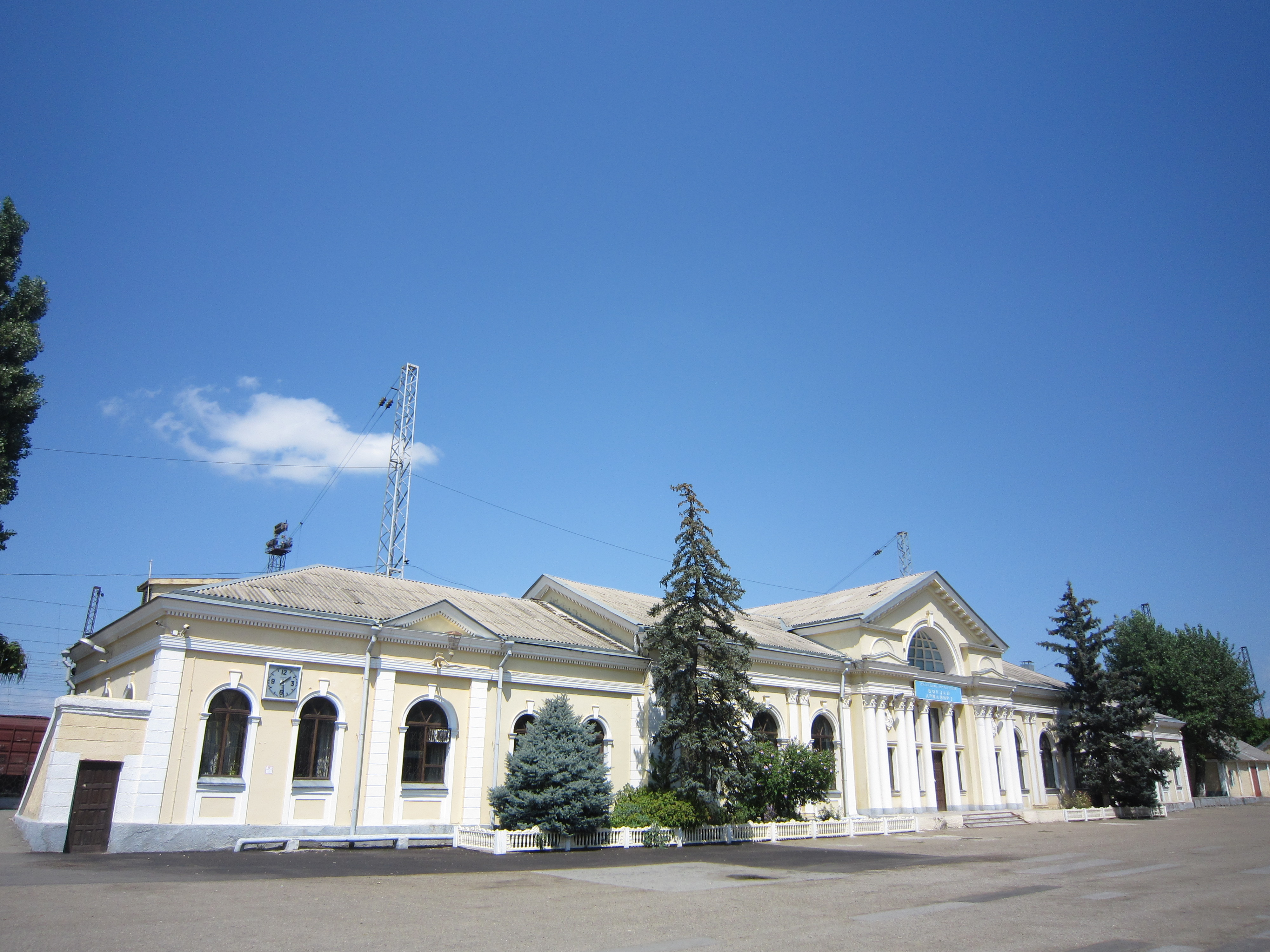 Здание вокзала станции Армавир-2